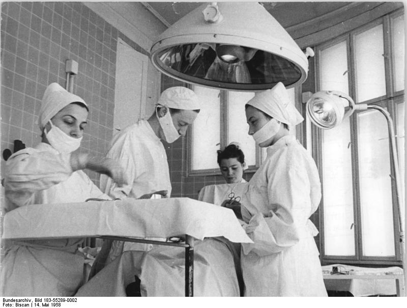 Bahrendorf, Schloss als Krankenhaus Zentralbild Biscan 14.5.1958 Gutsbesitzer-Schloss wurde Krankenhaus. Das Schloss des ehemaligen Rittergutsbesitzer Schaffer in Bahrendorf, Kreis Wanzleben, wurde nach 1945 in ein Krankenhaus umgewandelt. Nach und nach wurde ausgebaut, in der letzten Zeit durch Errichtung einer Entbindungsstation und einer Schwerkrankenstation. Heute ist es als Kreiskrankenhaus und Landambulatorium eine der schönsten und besten Einrichtungen des Gesundheitsdienste im Bezirk Magdeburg. UBz: Der ehemalige Wintergarten des Schlosses ist in einen Operationssaal umgewandelt worden, in dem alljährlich hunderte Operationen vorgenommen werden.